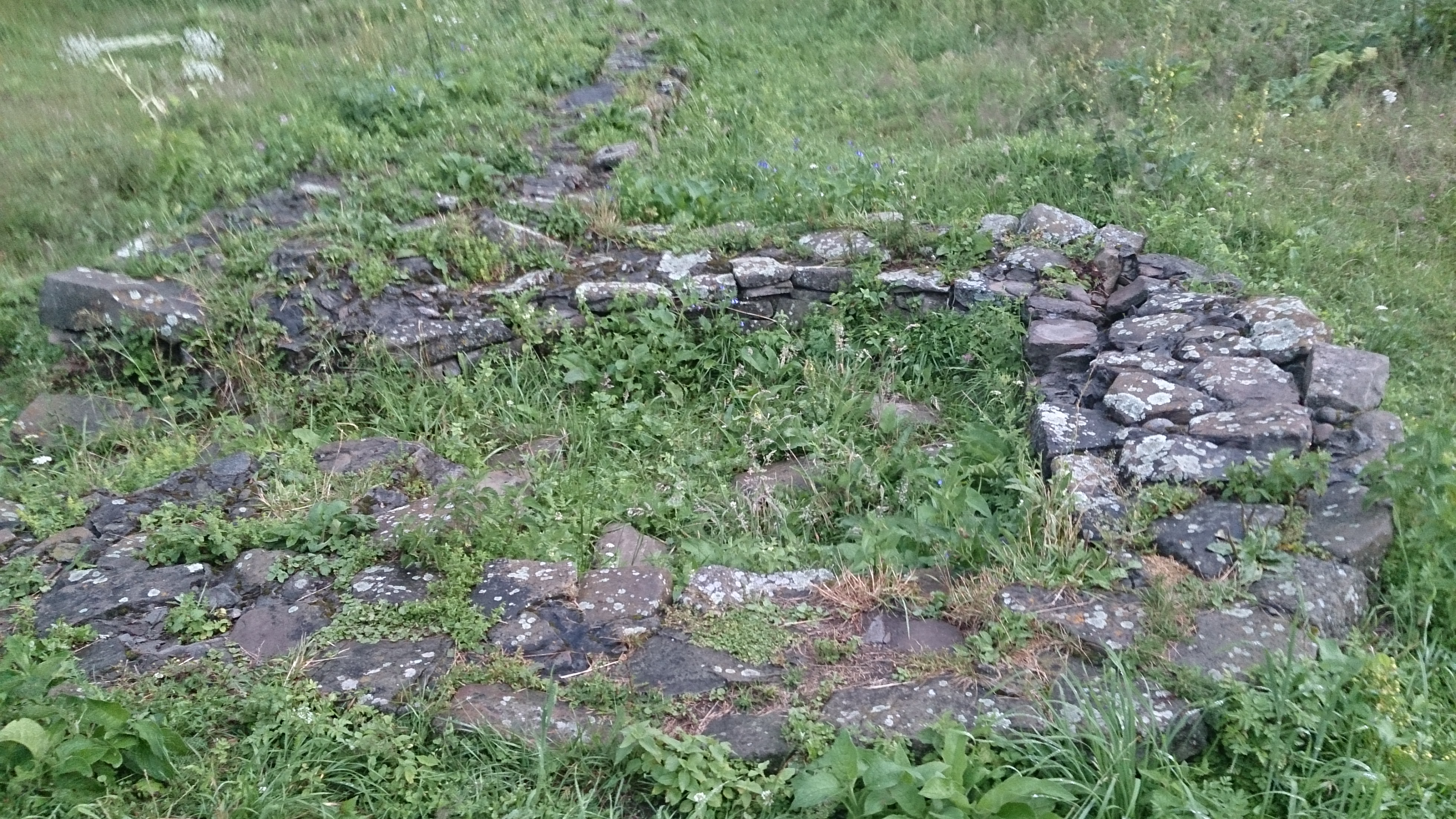 Астрономический круг (Республика Карачаево-Черкессия, Теберда, посёлок Нижний Архыз)